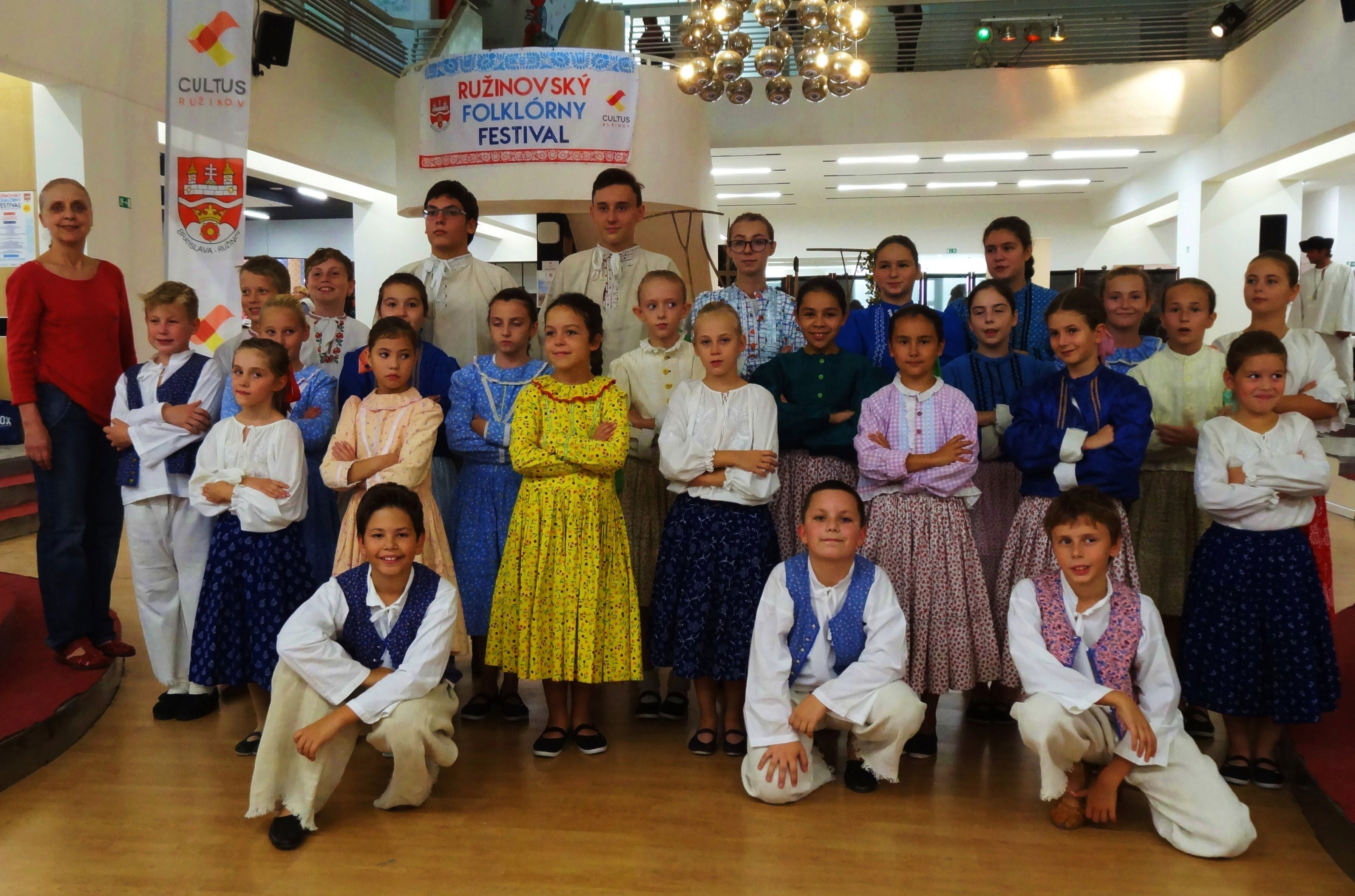 Trávniček na Ružinovskom folklórnom festivale